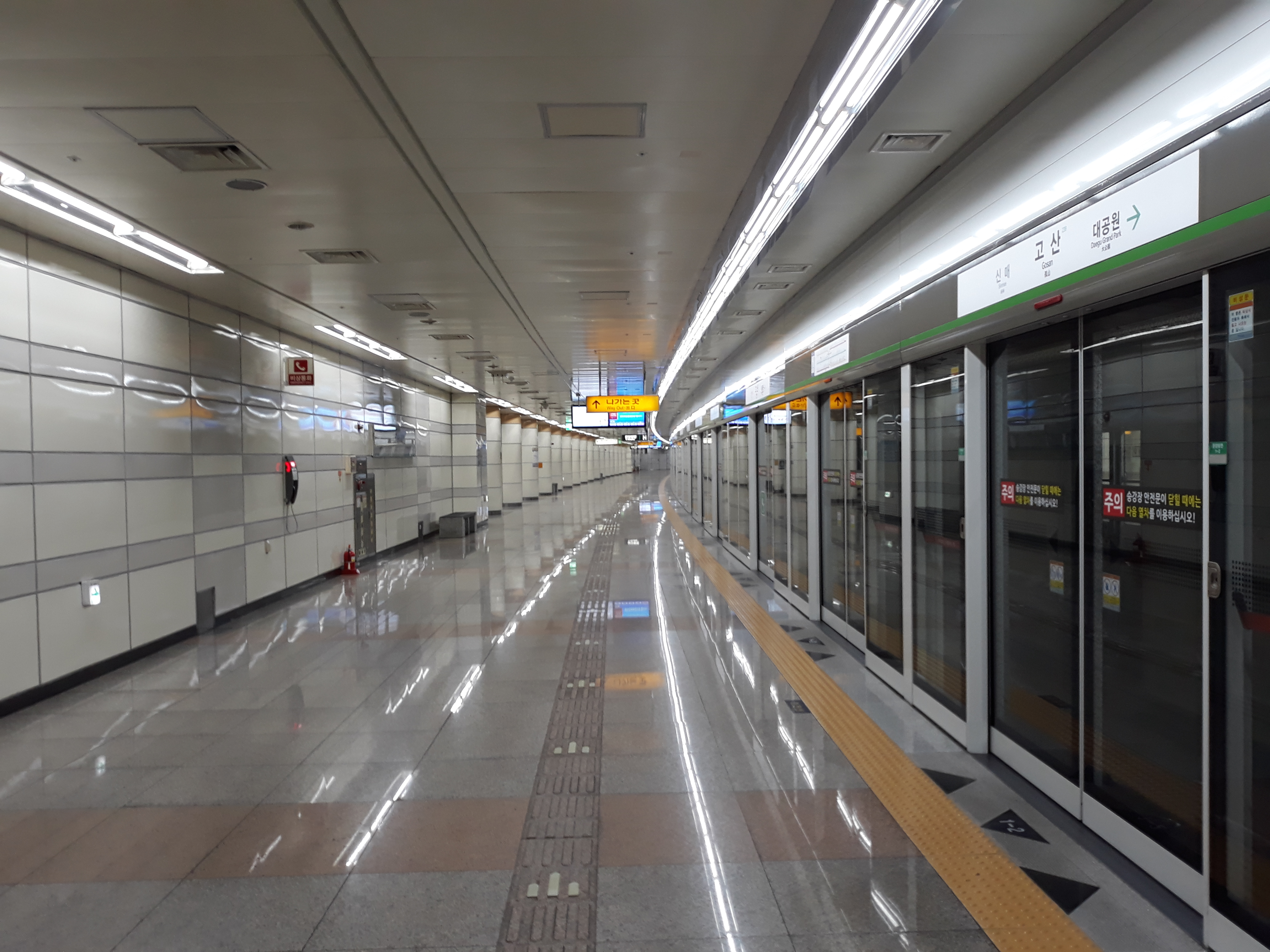 대구 도시철도 2호선 고산역 문양 방면 승강장